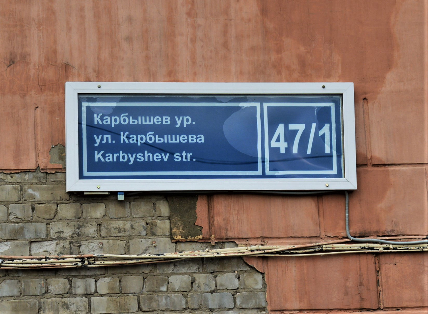 Казань, Горки. Адресная табличка на доме: ул. Карбышева, 47/1